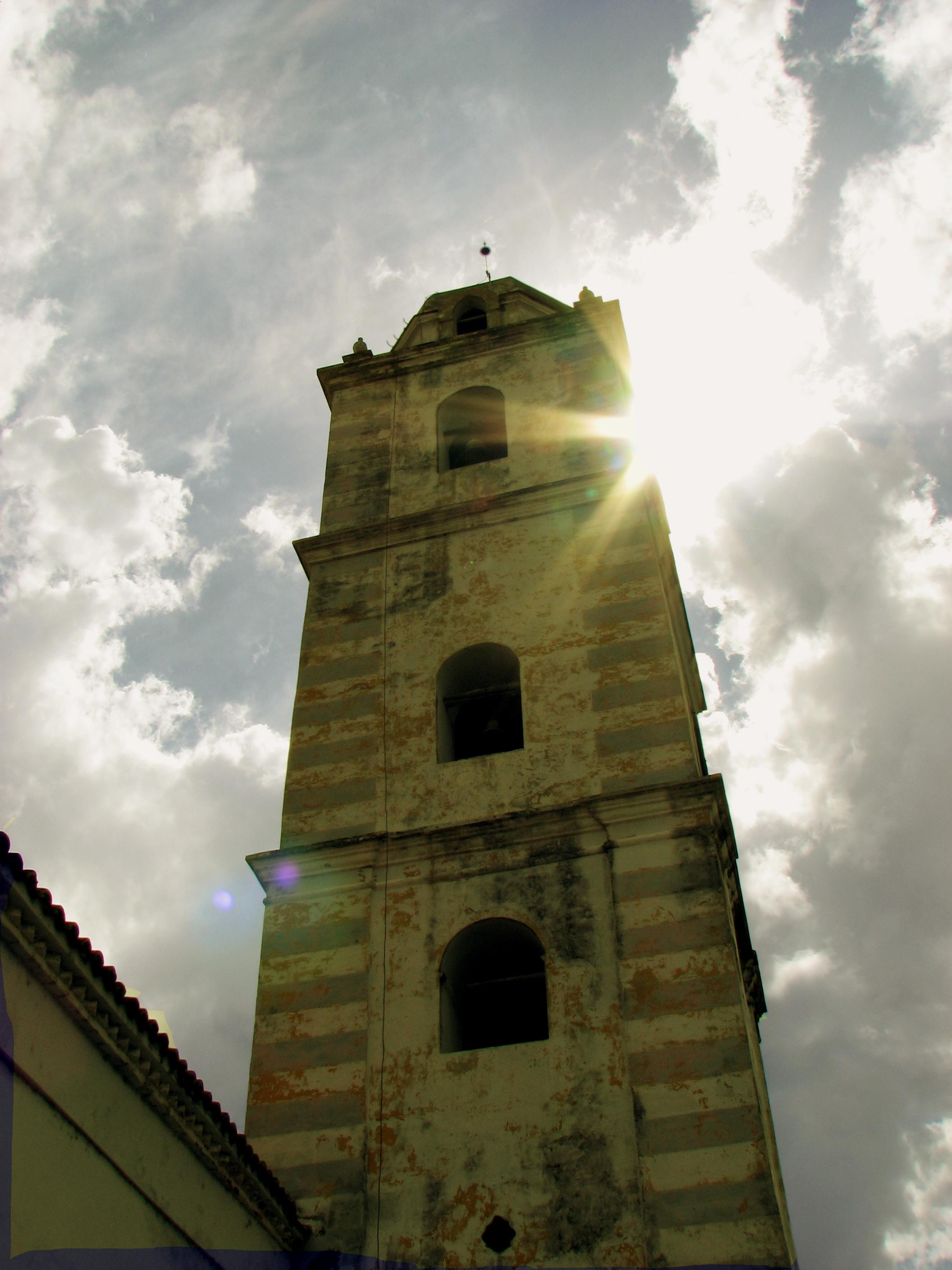 Torre de la Iglesia Parroquial Mayor del Espíritu Santo — en Provencia Sancti Spiritus. Cuba.